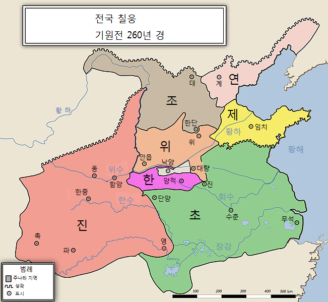 전국 칠웅 지도 한국어 번역판입니다. 서툴어서 편집 좀 해주세요 ^^